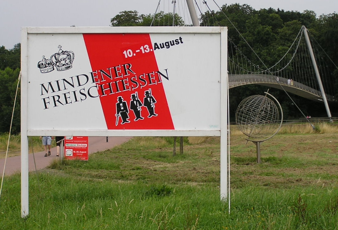 Werbeschild an der Fußgängerbrücke über die Weser in Minden, Nordrhein-Westfalen. Das Schild wirbt für das Volks- und Schützenfest Mindener Freischießen im Jahr 2006.